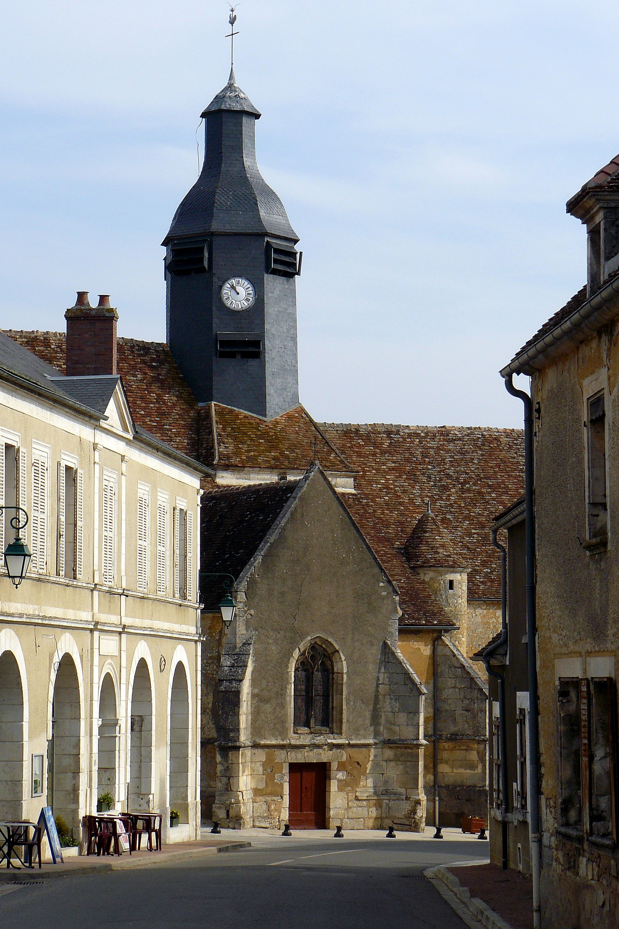 Lainsecq (Yonne, France)